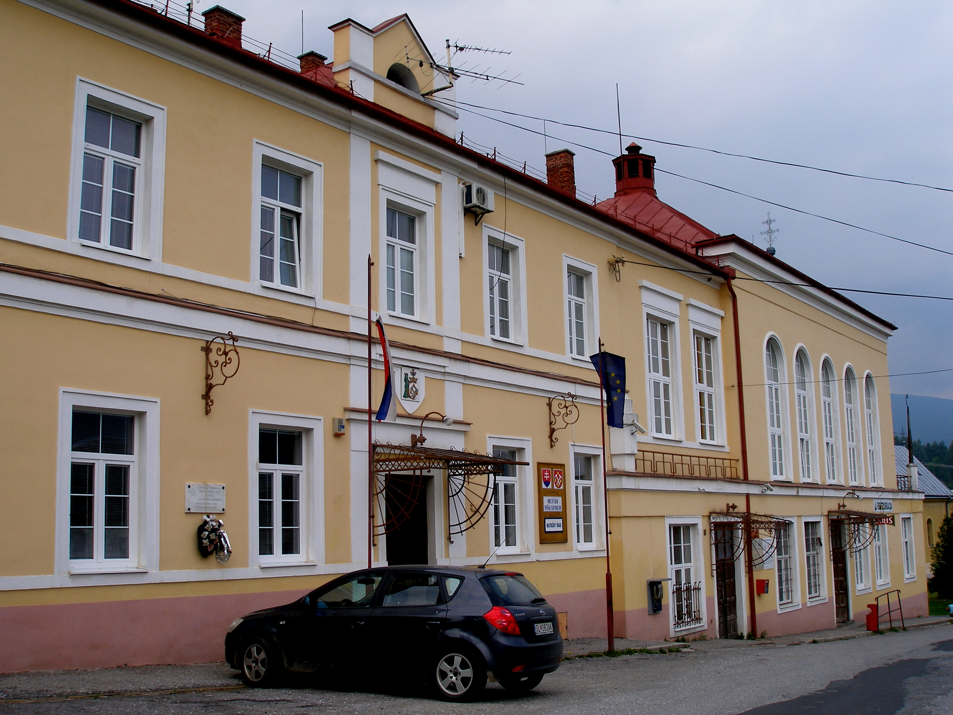 Obec Mníšek nad Hnilcovm okres Oelnica.